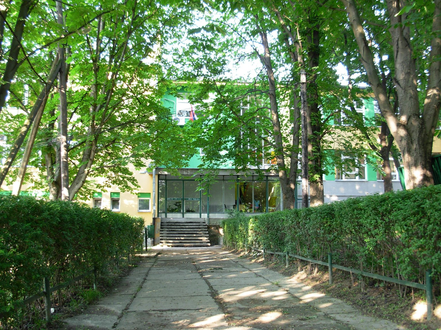 Osnovna škola "Jovan Jovanović Zmaj" u Sremskoj Kamenici.